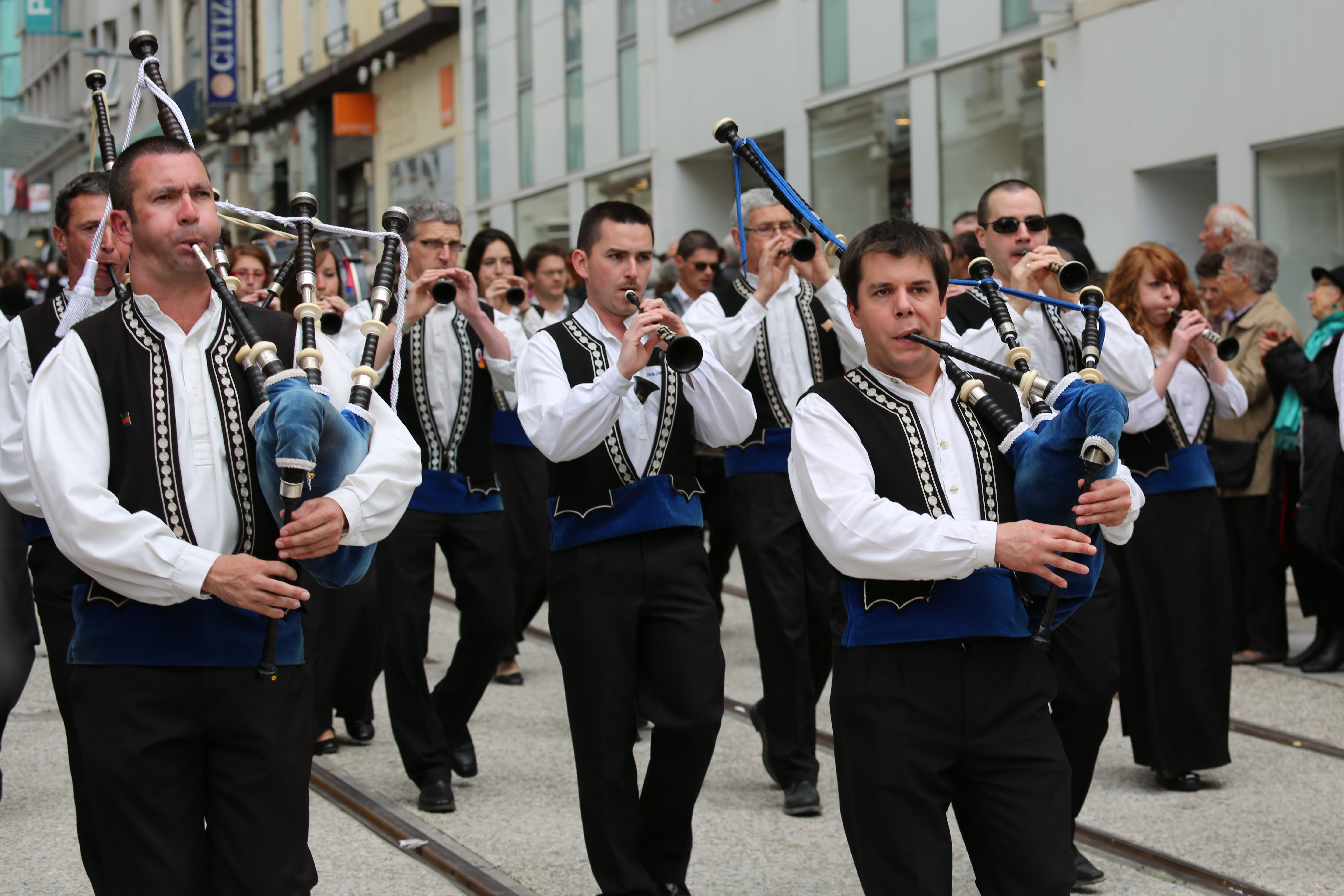 Photo de la parade du printemps des sonneurs le 19 mai 2012 à Brest